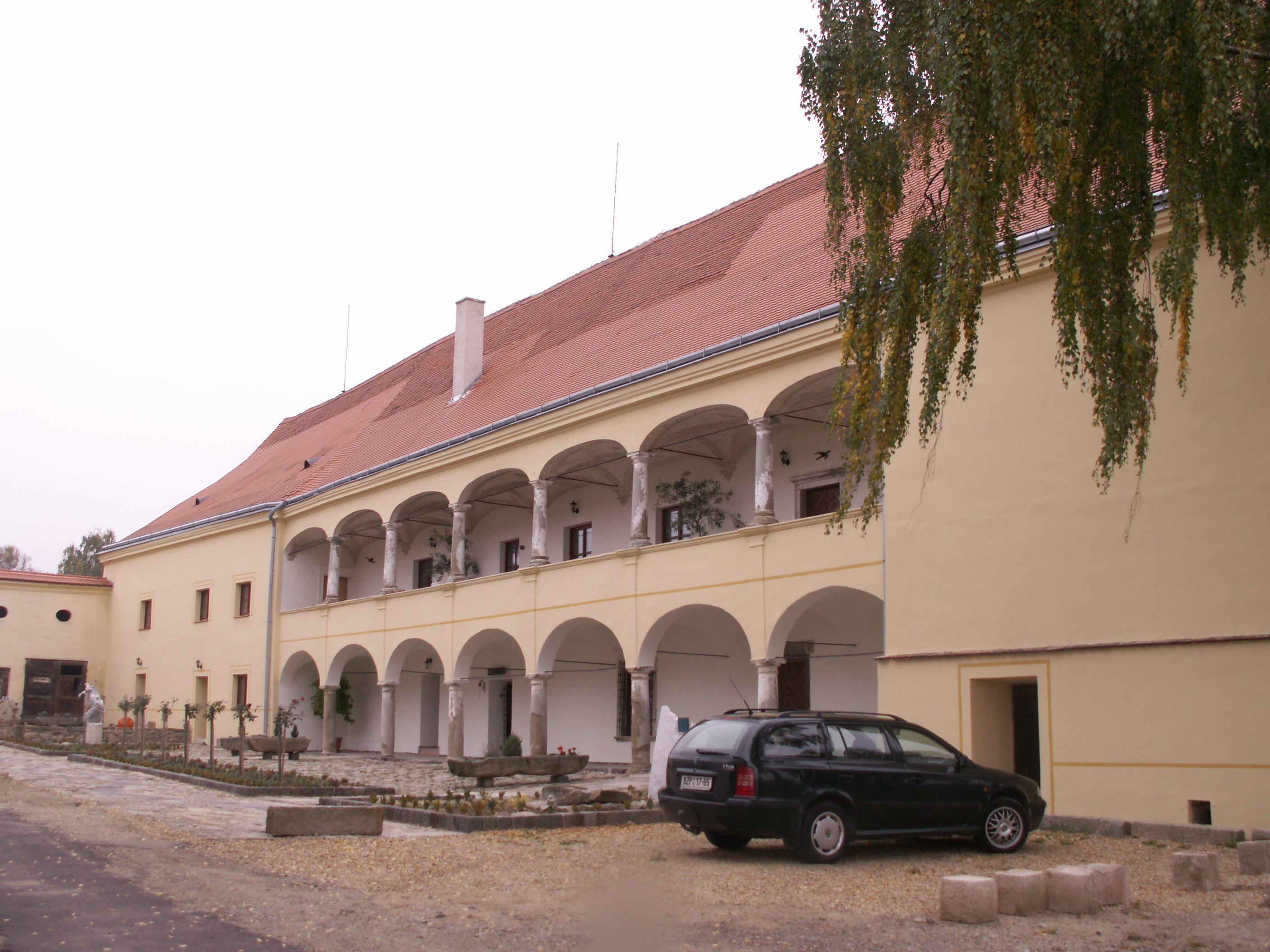 Slatina (okres Znojmo) - renesanční zámek, opravené arkády